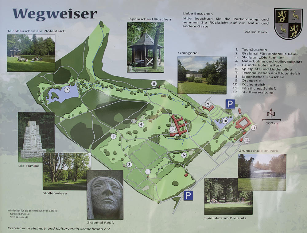 Wegweiser (Plan) des Parks Ebersdorf in Thüringen